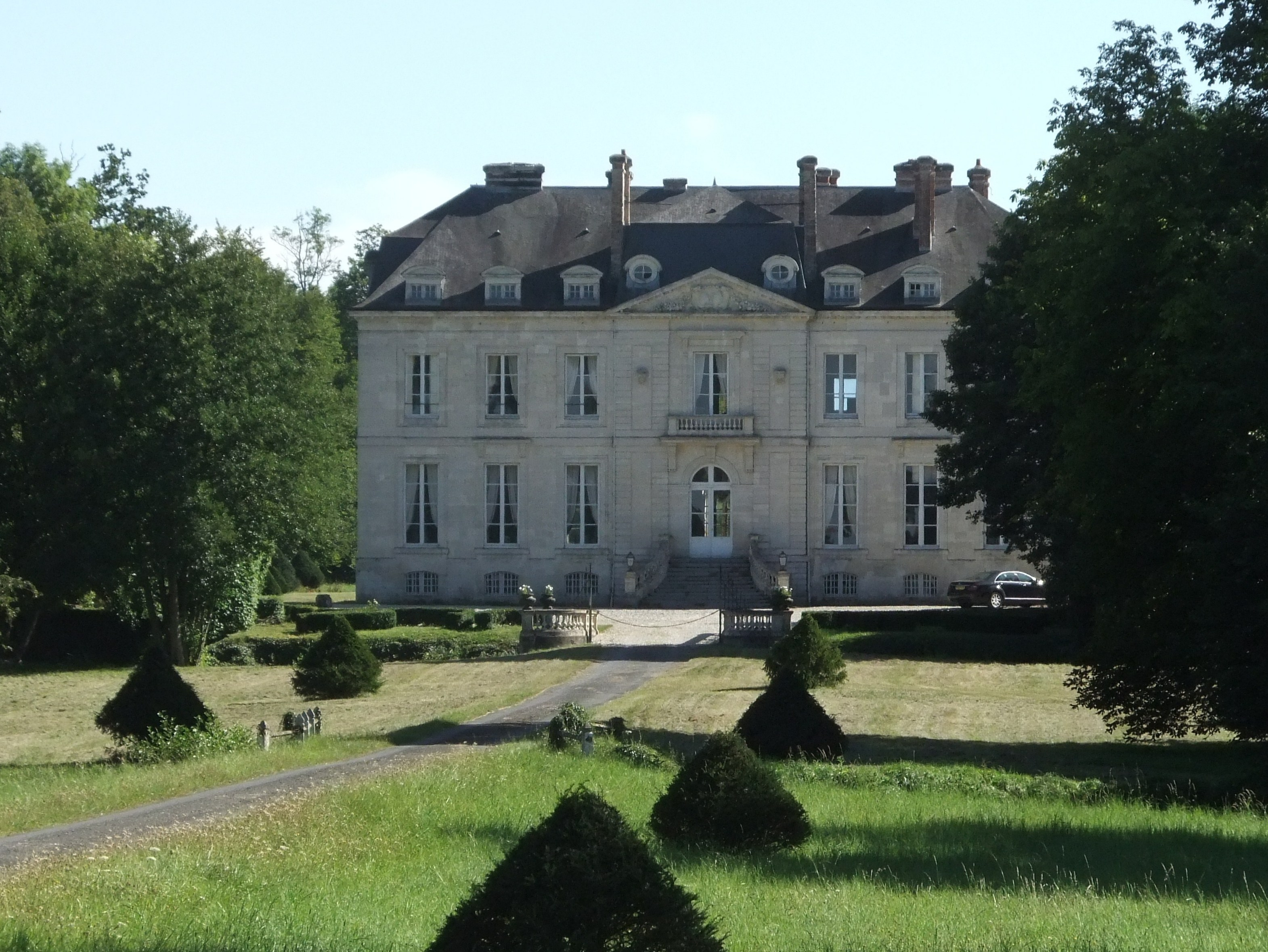 monument historique inscrit .